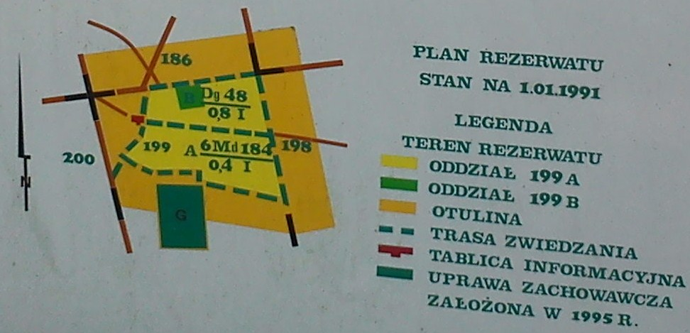 Tablica z planem rezerwatu Klasztorne Modrzewie in situ wykonana przez Nadleśnictwo Łopuchówko.